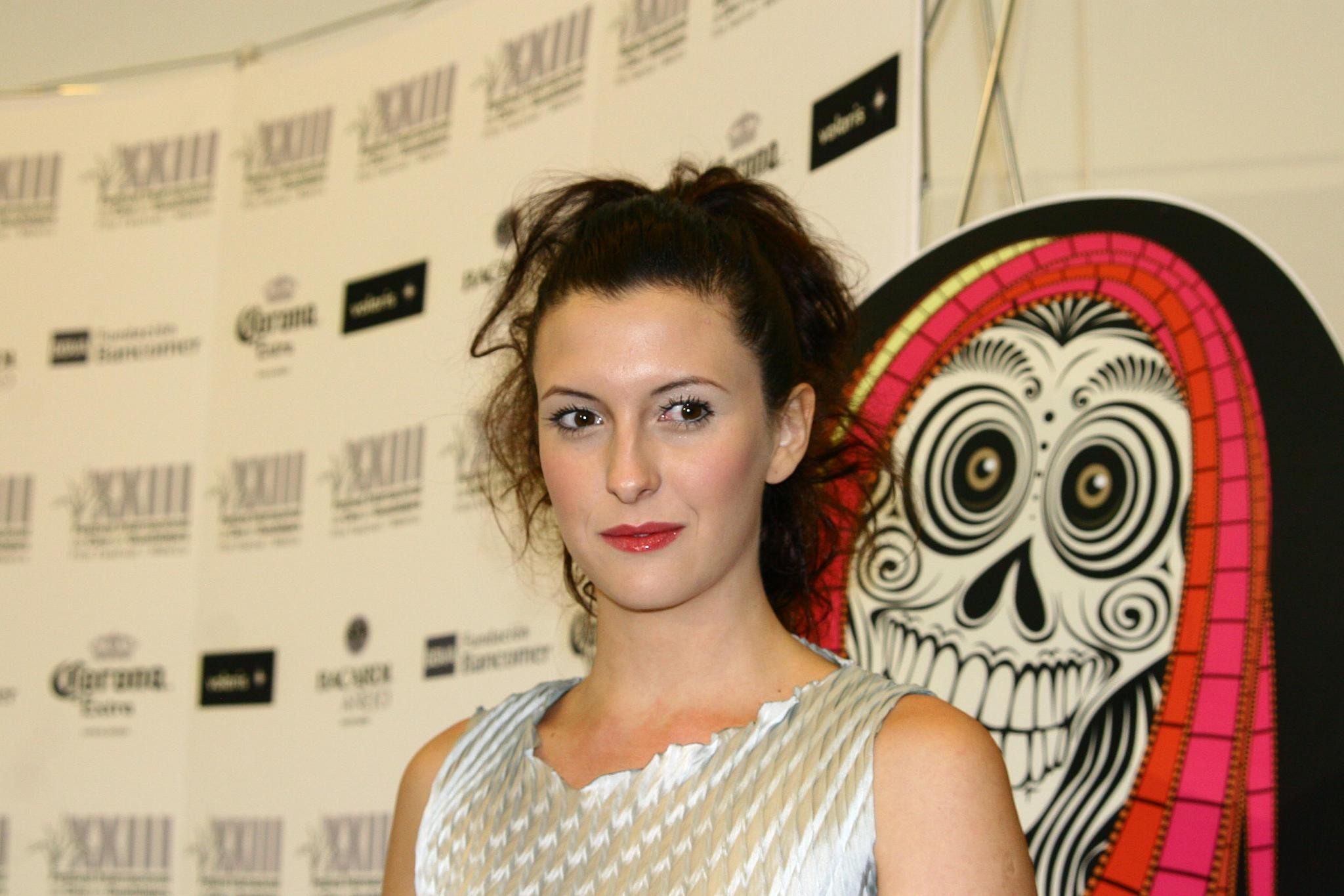 Guadalajara, Jalisco, 13 de marzo de 2008. Antonella Costa, actriz de la película No mires para abajo, en su Encuentro con los medios.